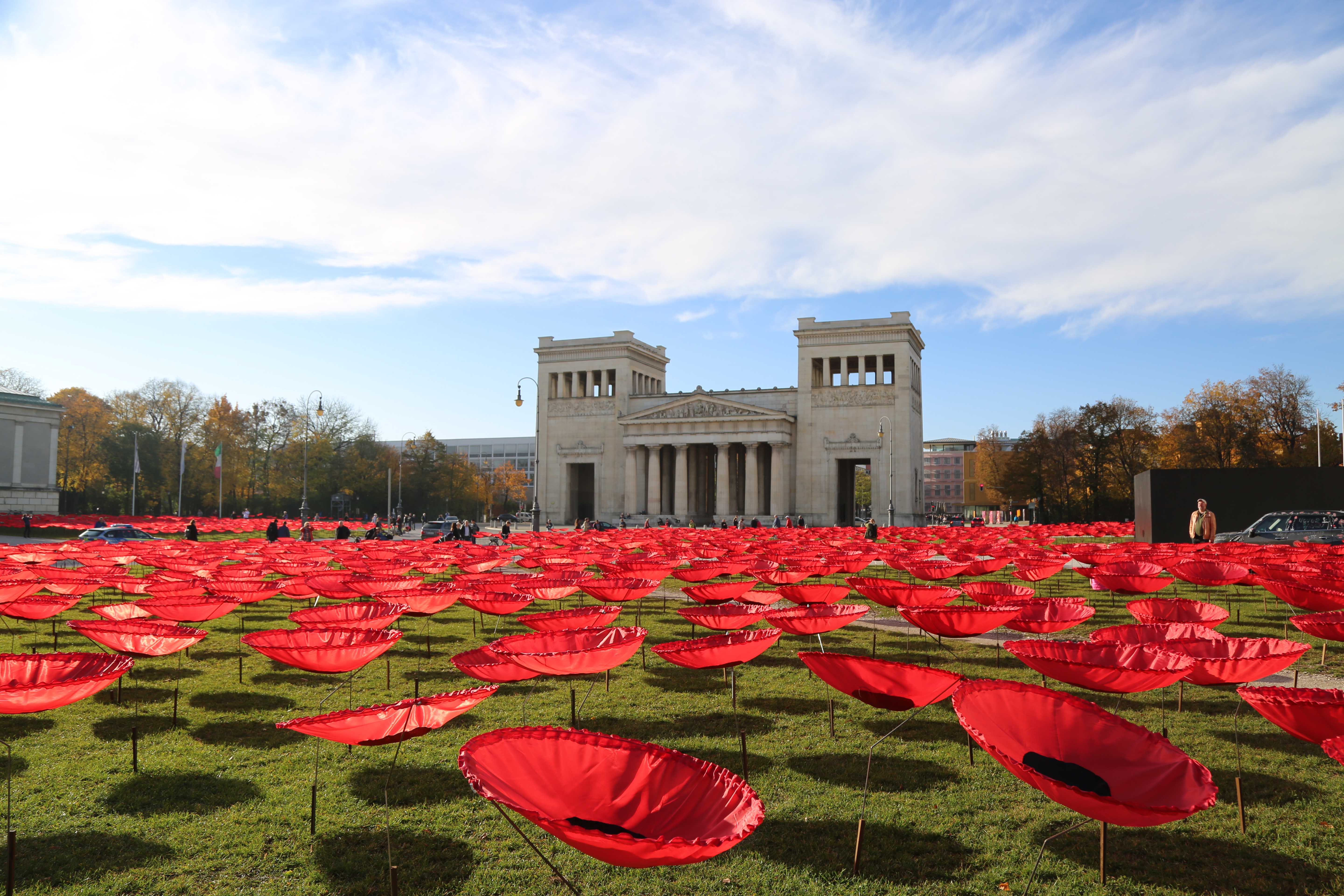 Kunstaktion von Walter Kuhn: "Niemals wieder" - 3200 Mohnblumen auf dem Münchner Königsplatz in Erinnerung an das Ende des Ersten Weltkriegs am 11.November 1918 mit dem Vertrag von Campiègne vor 100 Jahren.